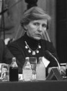 ADN-ZB/Senft/13.12.81 Berlin: Die "Berliner Begegnung zur Friedensförderung" wurde in der DDR-Hauptstadt eröffnet. An dem zweitägigen Treffen nehmen auf Einladung des DDR-Schriftstellers Stephan Hermlin rund 100 Schriftsteller, Künstler und Wissenschaftler aus beiden deutschen Staaten sowie aus weiteren europäischen Ländern und aus Westberlin teil. Unter ihnen sind Prof. Jürgen Kuczynski, Hermann Kant, Stephan Hermlin, Bernt Engelmann (BRD) und Ingeborg Drewitz (Westberlin).-v.l.n.r.